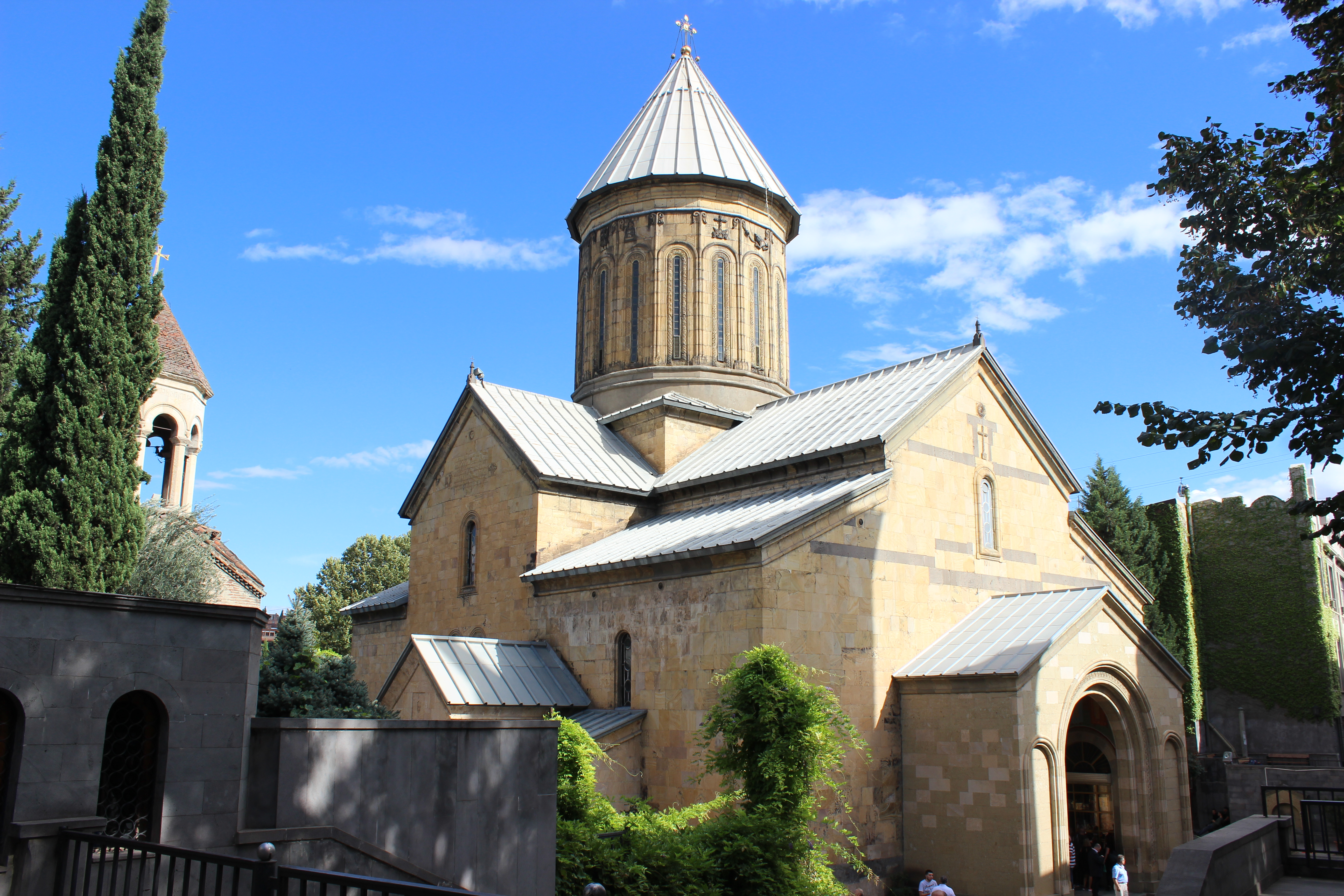 სიონის ეკლესია